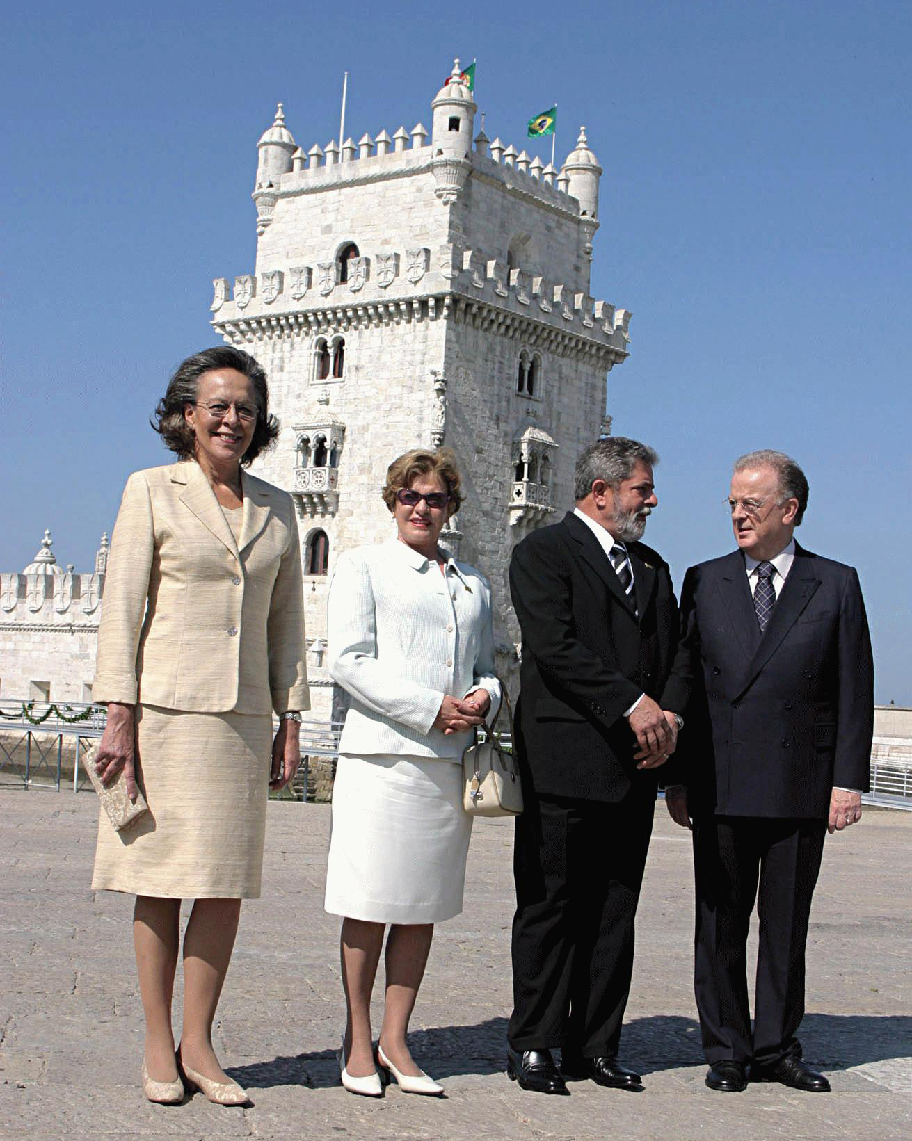 Acompanhados das esposas, Lula da Silva e Jorge Sampaio posam para fotos em frente à Torre de Belém.